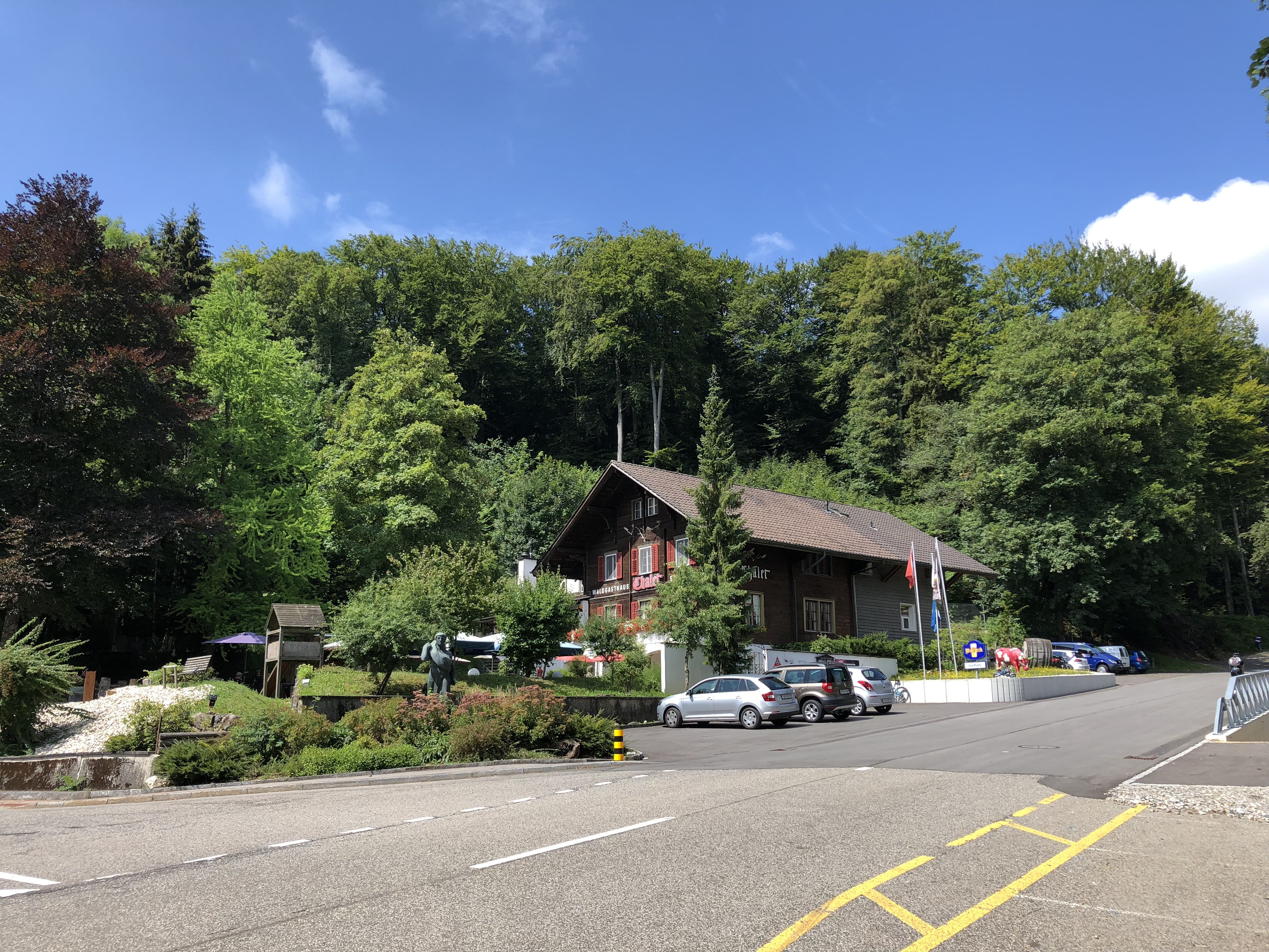 Salhöhe